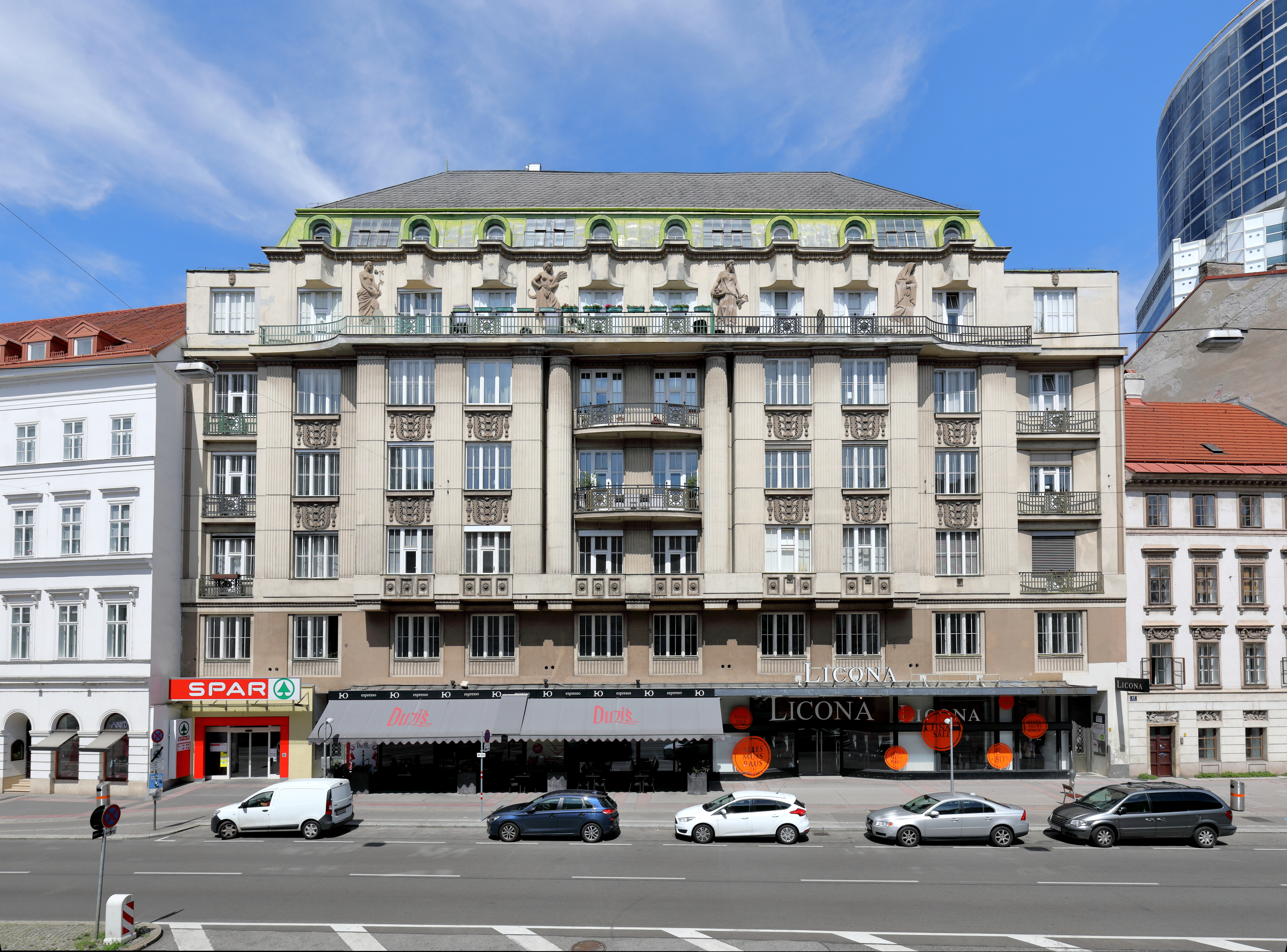 Das Wohn- und Geschäftshaus „Fürstenhof“ an der Adresse Praterstraße 25 im 2. Wiener Gemeindebezirk Leopoldstadt.Das Gebäude wurde im Auftrag von Georg Spielmann 1913 von dem Architekten Rudolf Perco errichtet. Die Skulpturen (Vier Jahreszeiten) an der Fassade schuf Alfonso Canciani. Ursprünglich befand sich im Gebäude ein Kaffeehaus gleichen Namens sowie ein Theater.